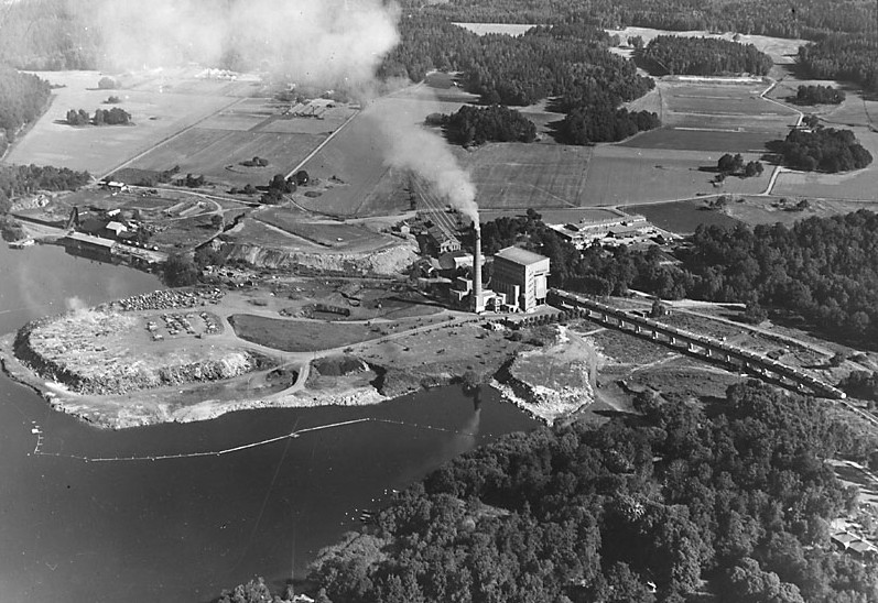 Flygbild över Lövsta renhållningsverk och omgivning mot norr